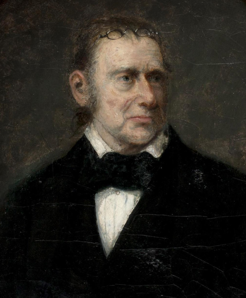 Self-portrait